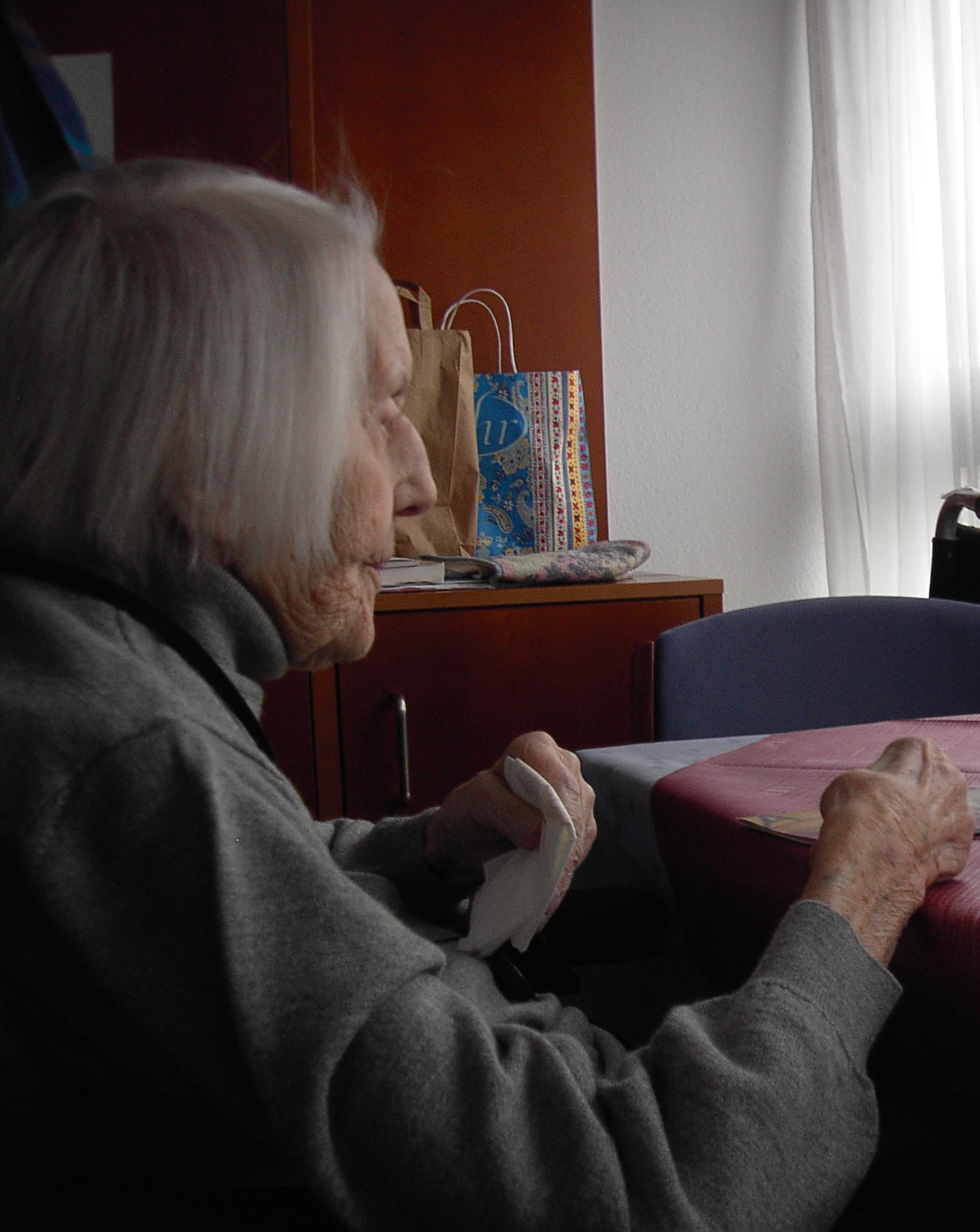 Das Foto zeigt die Künstlerin an ihrem Tisch in ihrem Zimmer sitzend.